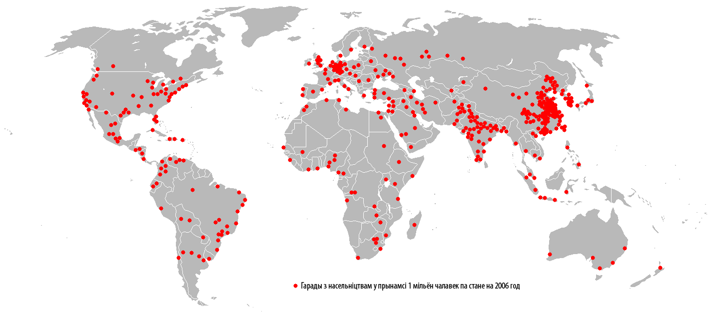 Беларуская (тарашкевіца): Гарады сьвету з насельніцтвам болей за 1 млн жыхароў